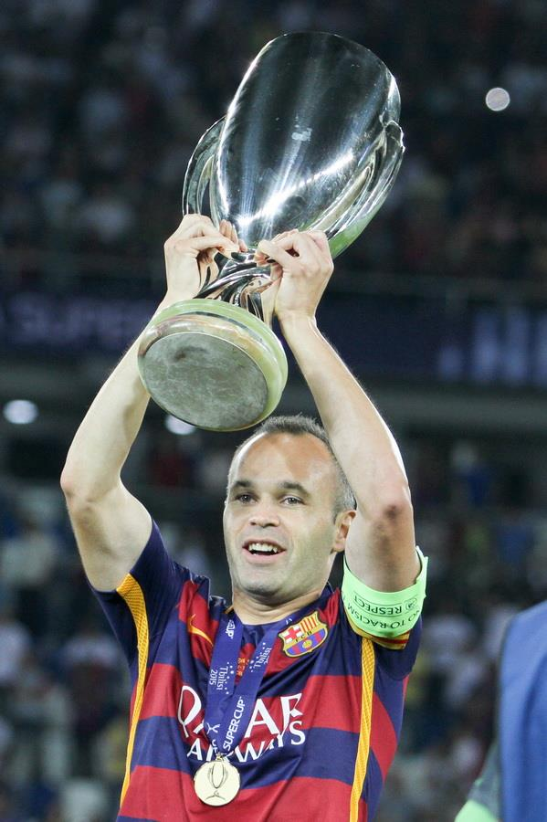 Нагородження переможців матчу за Суперкубок УЄФА 2015 року у Тбілісі. Грузія